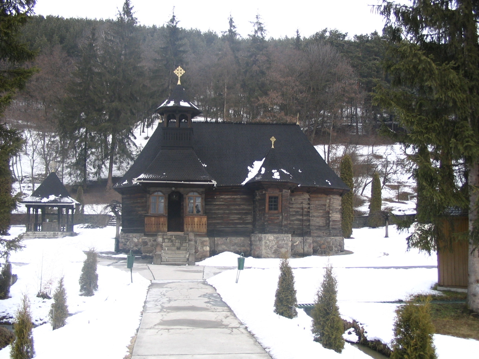 Biserica de lemn de la mãnãstirea Sf. Ilie din Topliţa, judeţul Harghita. Autor: Bogdan Ilieş Data: februarie 2005